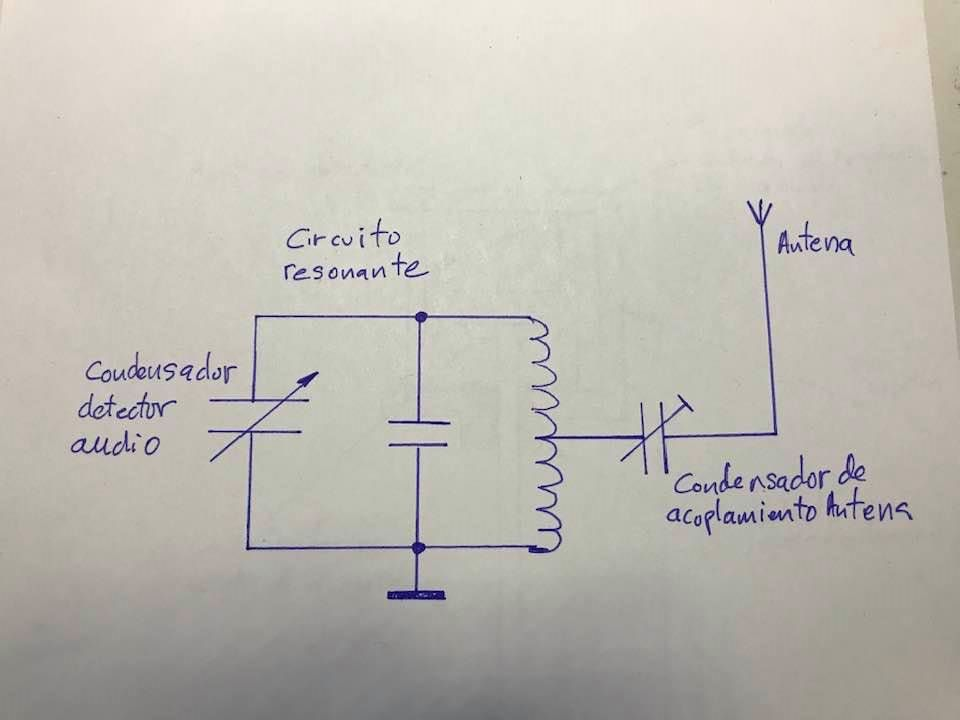 Esquema de un endovibrador simple.